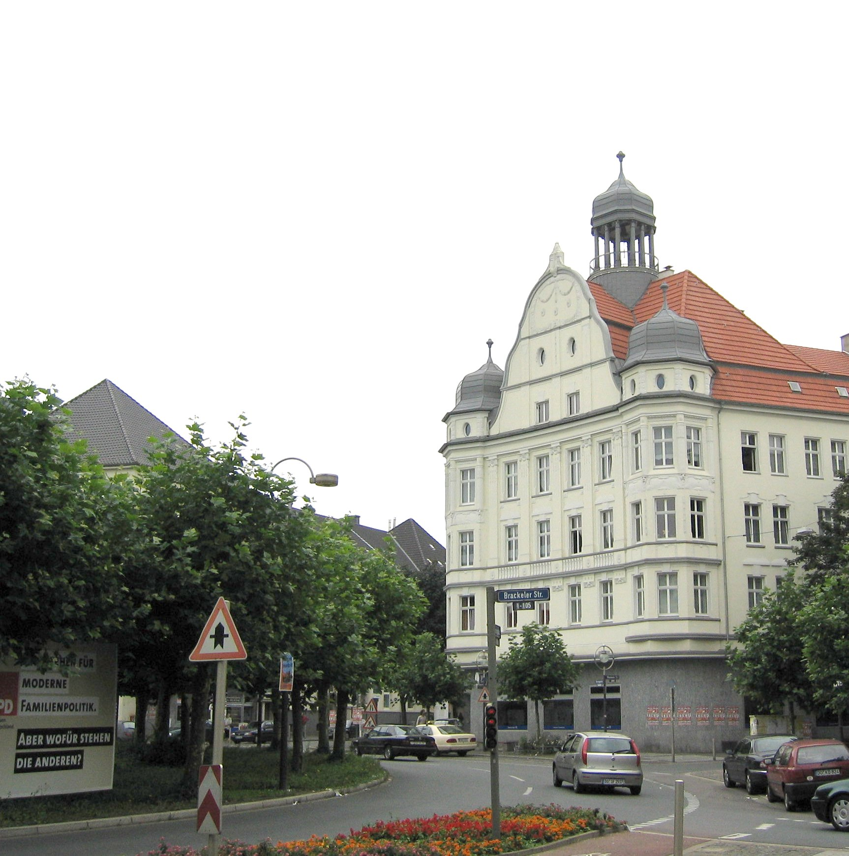 Borsigplatz Dortmund mit Wohnhaus Borsigplatz 12